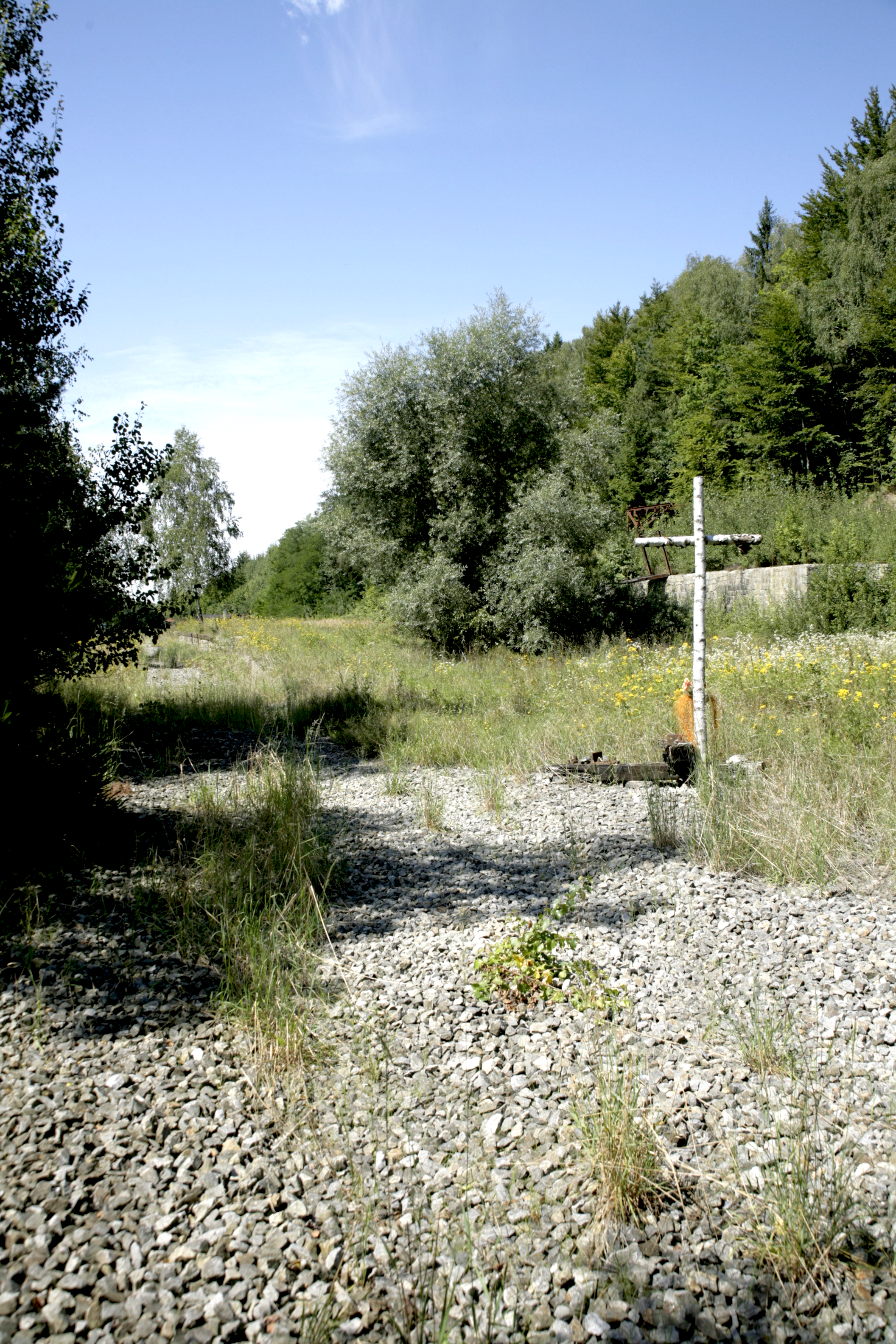 Das frühere Bahngelände der Ortschaft Nammering. Hier hielt 1945 der Evakuierungszug aus Buchenwald